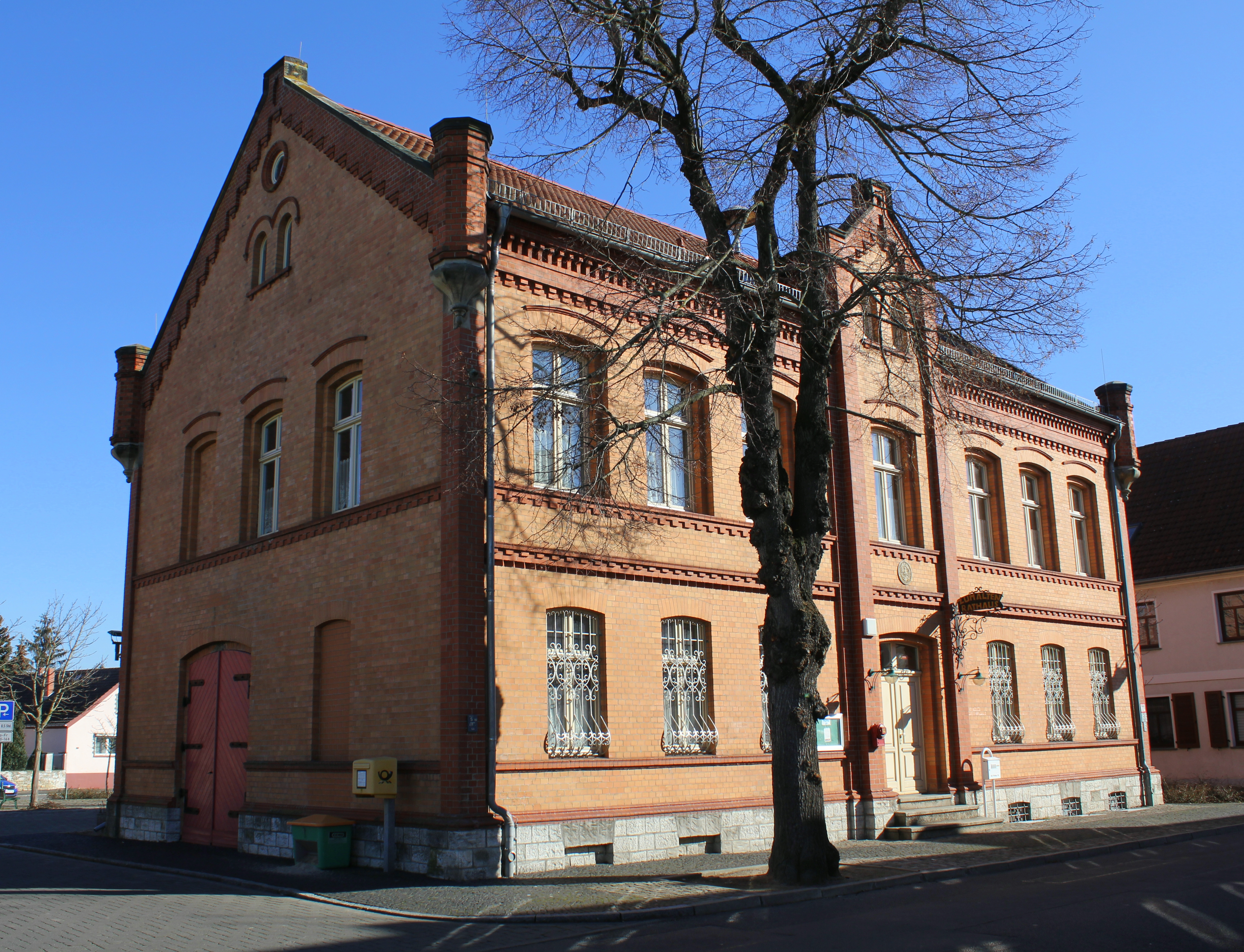 Rathaus Alt Frohse 19 Schönebeck-Frohse